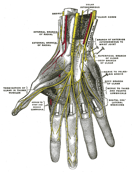 Deep palmar nerves. (Testut.)